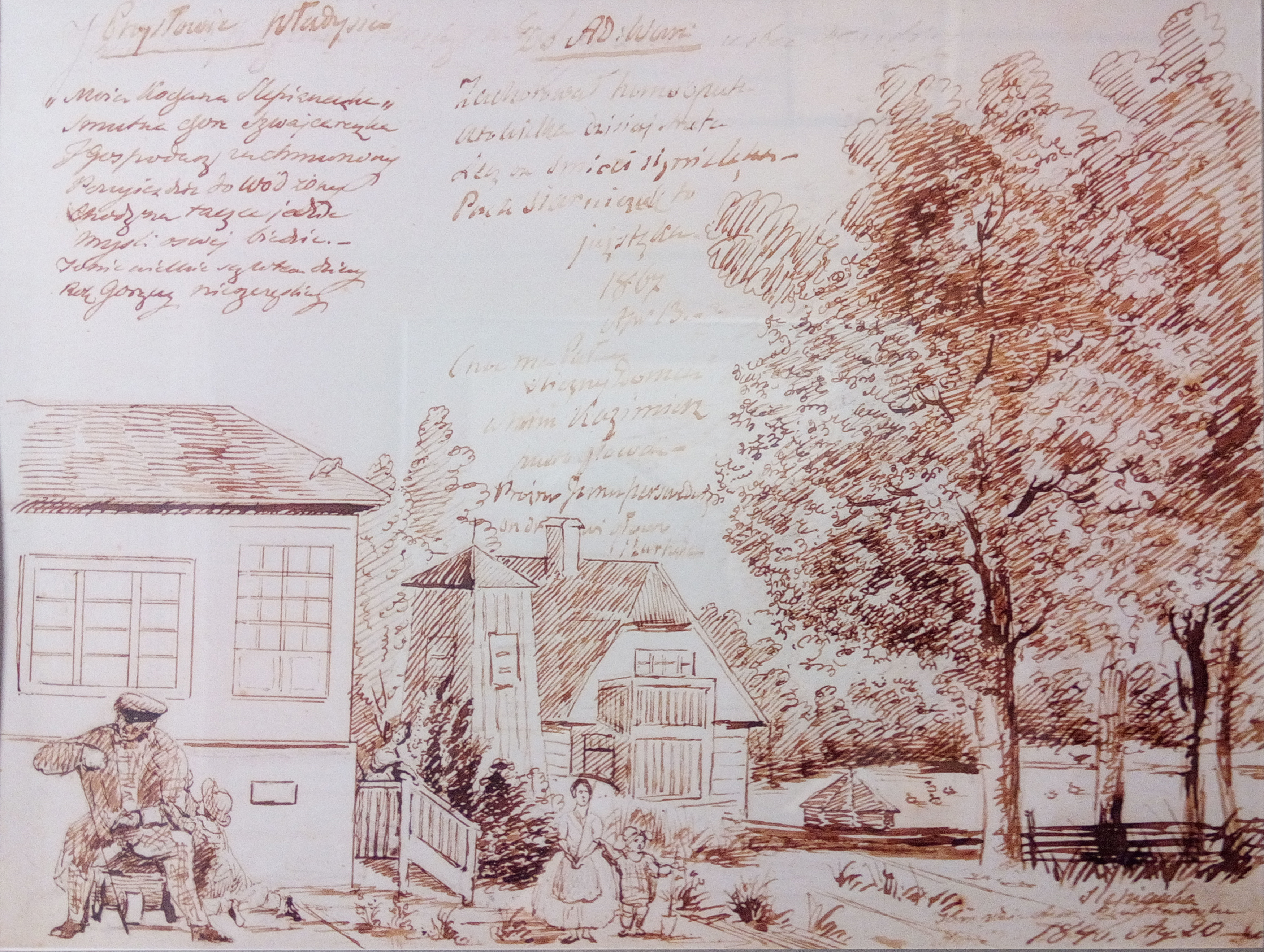 Беларуская (тарашкевіца): Менск (Miensk), Сьляпянка Малая (Ślapanka Małaja)